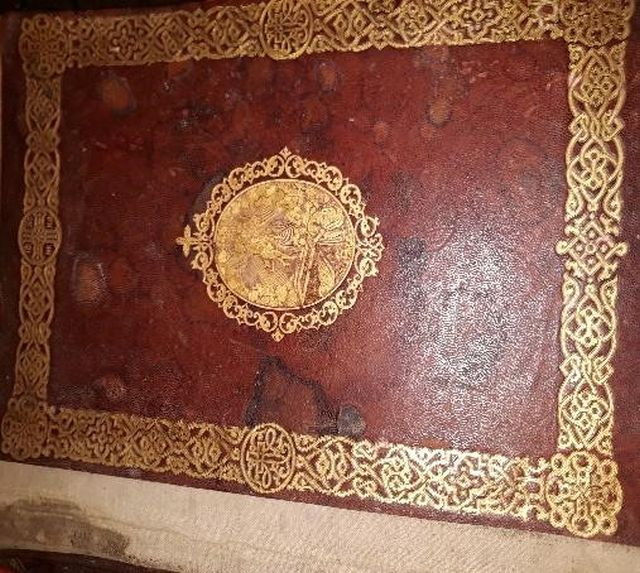 Jevanđelje iz 1893.god.